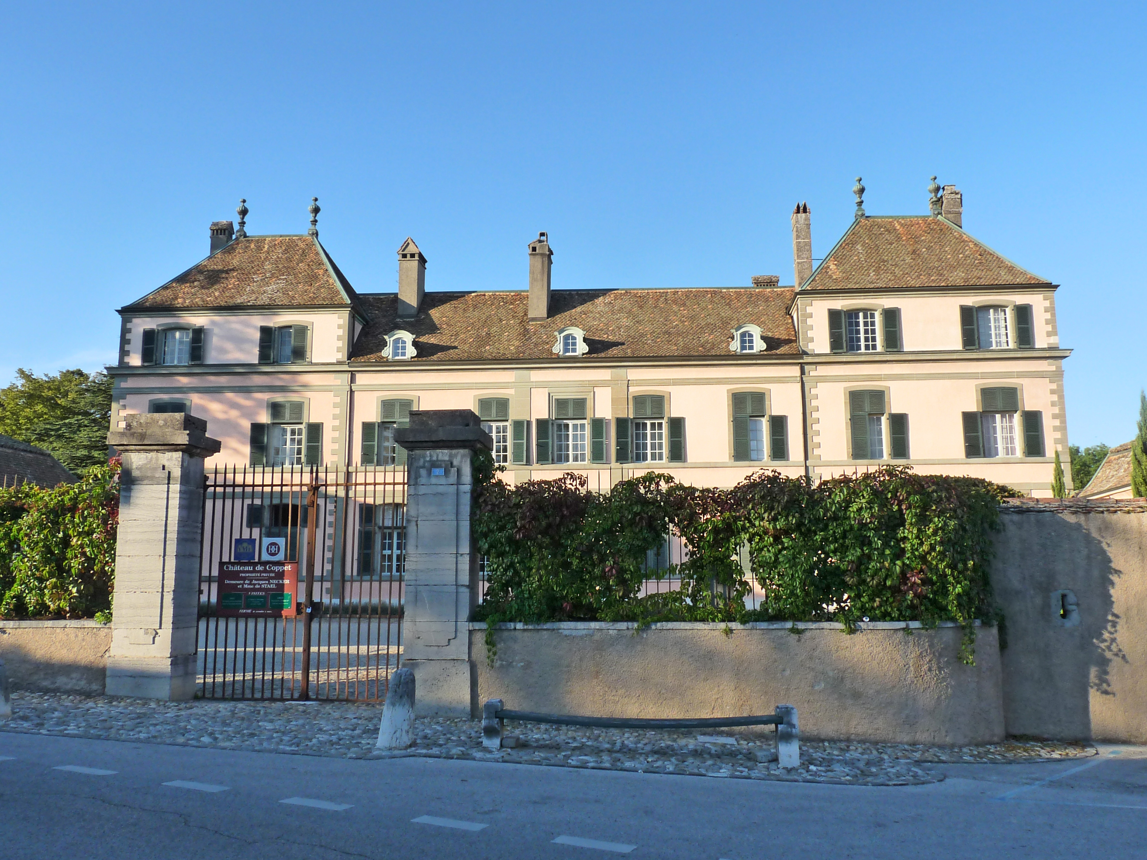 Façade du château de Coppet (Vaud, Suisse)